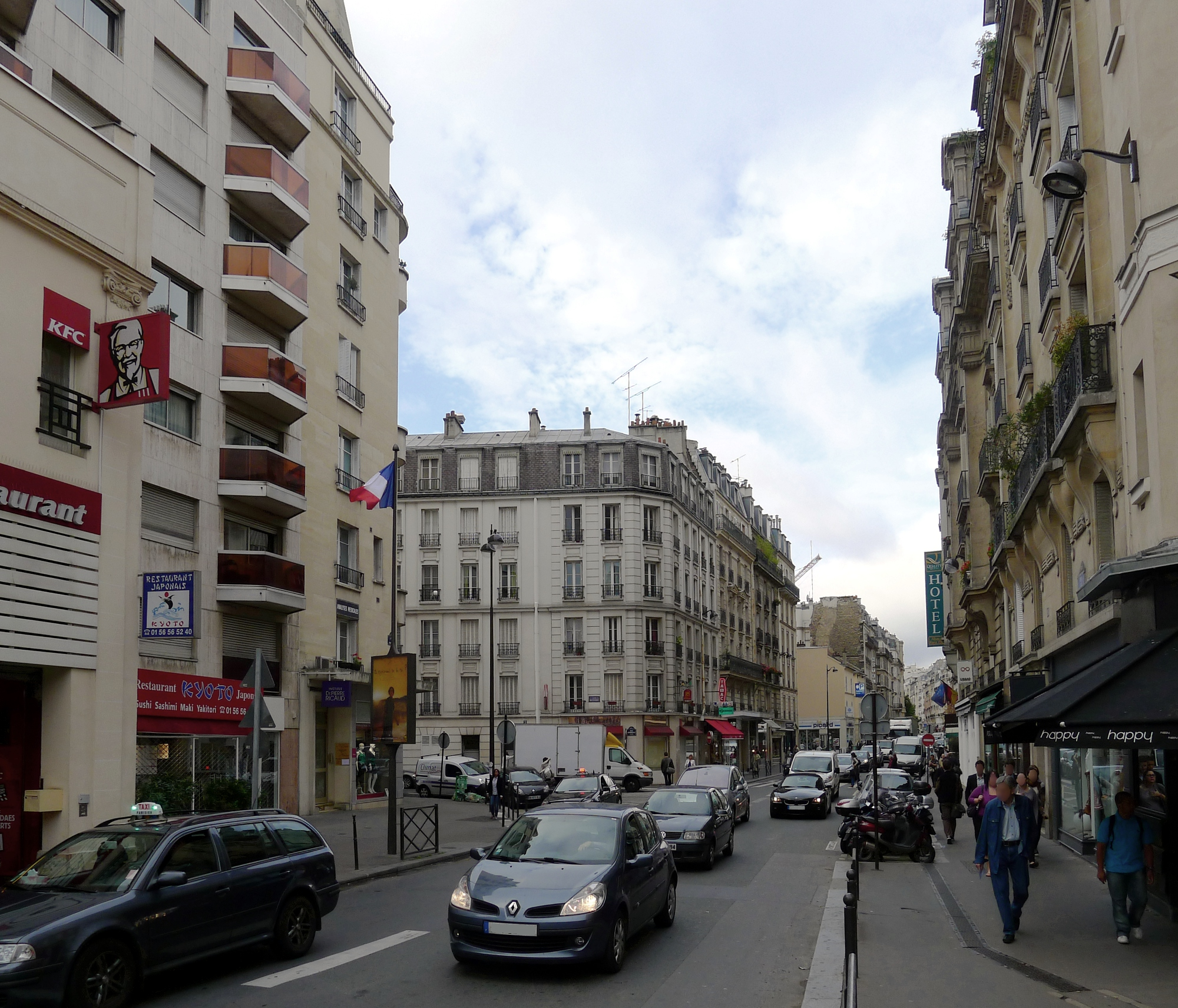 No 351 de la rue de Vaugirard (au niveau du métro Convention) - Paris XV